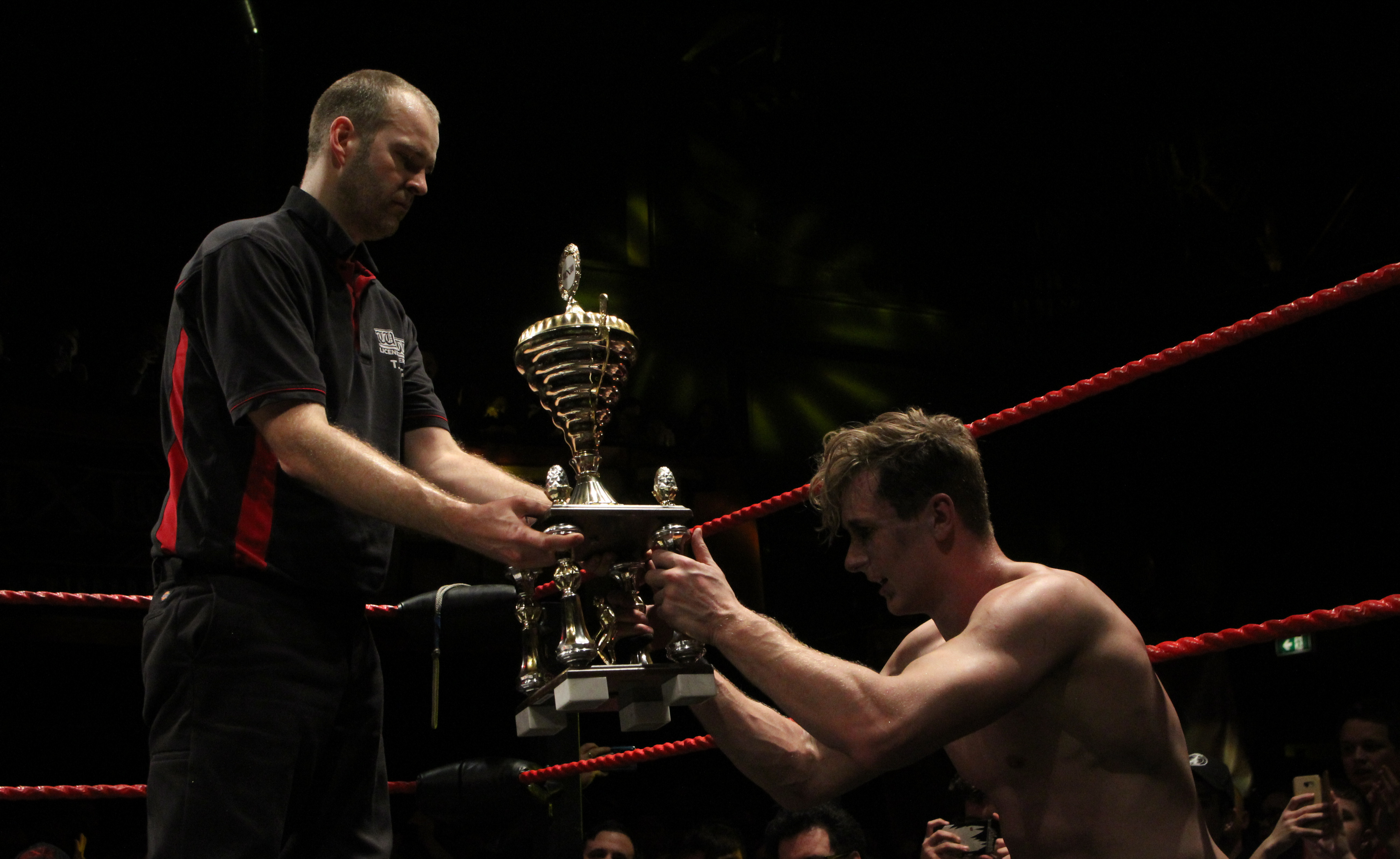 Cara Noir (à droite) reçoit le trophée 16 Carat Gold.